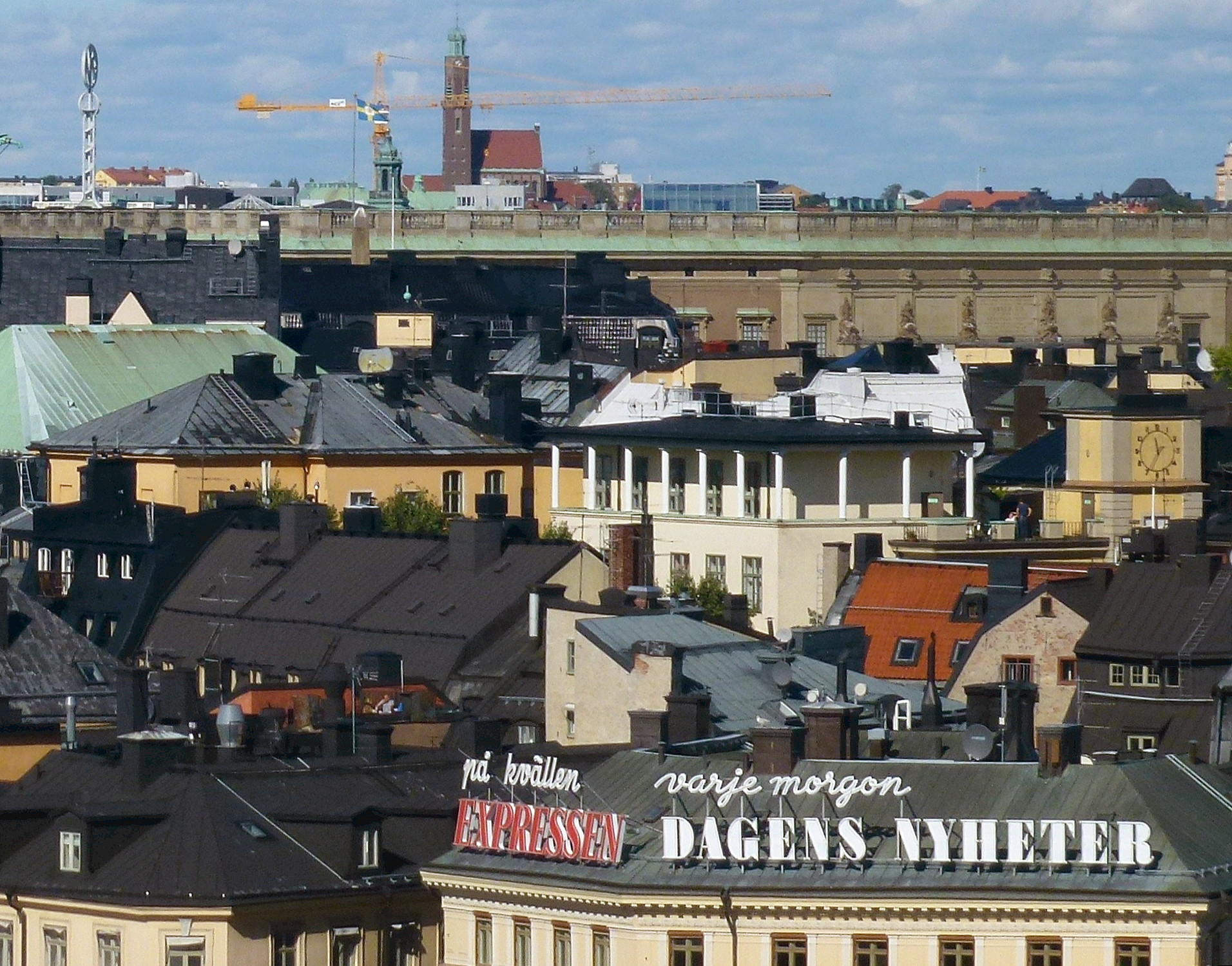 Över takåsarna av Gamla stan med Slottet i bakgrunden i mitten syns Storkyrkoskolan och fastigheten Medusa 1 längst fram till höger